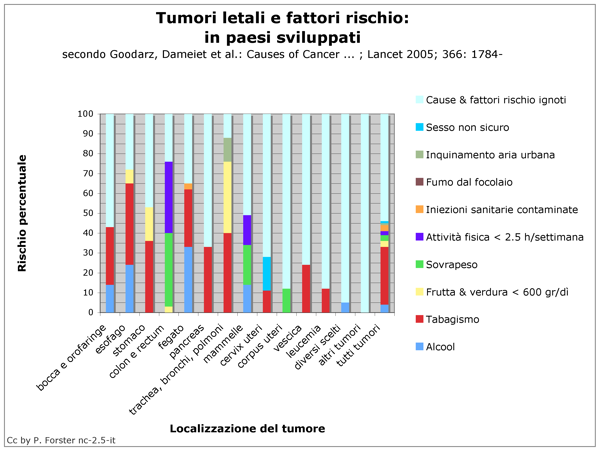 Medicina, Epidemiologia, Patologia, Malattie, Oncologia, tumore, cancro; mondiale; Fattori rischio: Alcool, Tabagismo, Frutta & verdura scarsa, Sovrapeso, Attività fisica scarsa, Iniezioni sanitarie contaminate, Fumo dal focolaio, Inquinamento aria urbana, Sesso non sicuro; Tumori: bocca e orofaringe, esofago, stomaco, colon e rectum, fegato, pancreas, trachea, bronchi, polmoni, mammelle, cervix uteri, corpus uteri, vescica, leucemia, altri tumori, tutti tumori